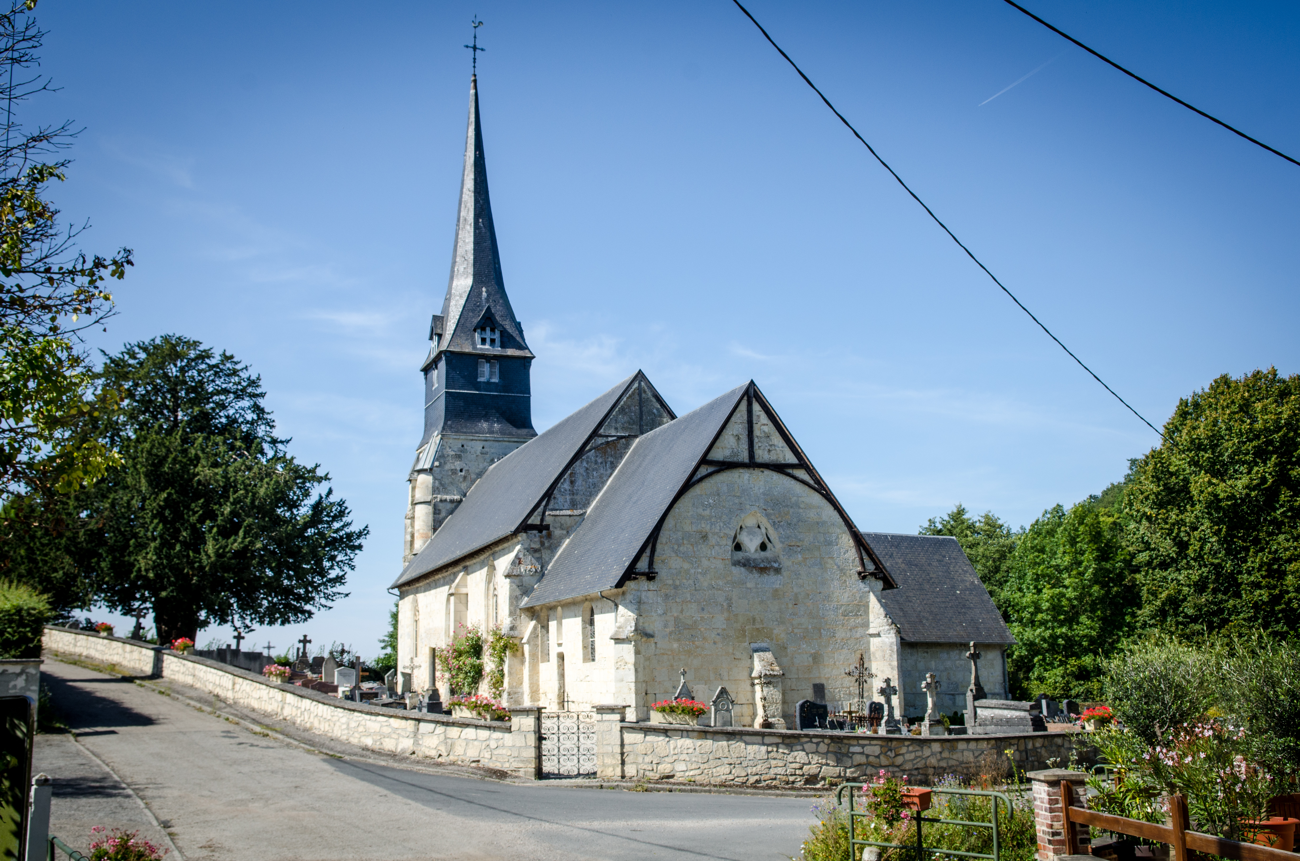 Eglise Sainte-Marguerite à Sainte-Marguerite-des-Loges .